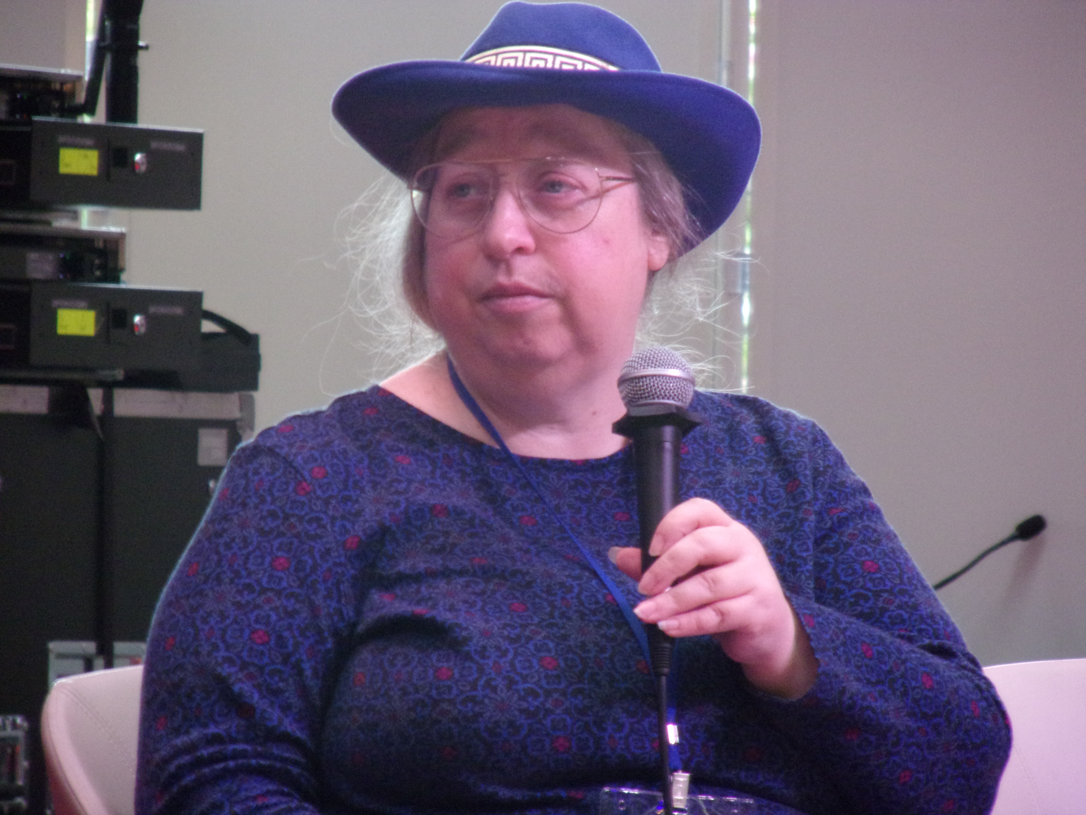 Jo Walton aux Utopiales 2019.